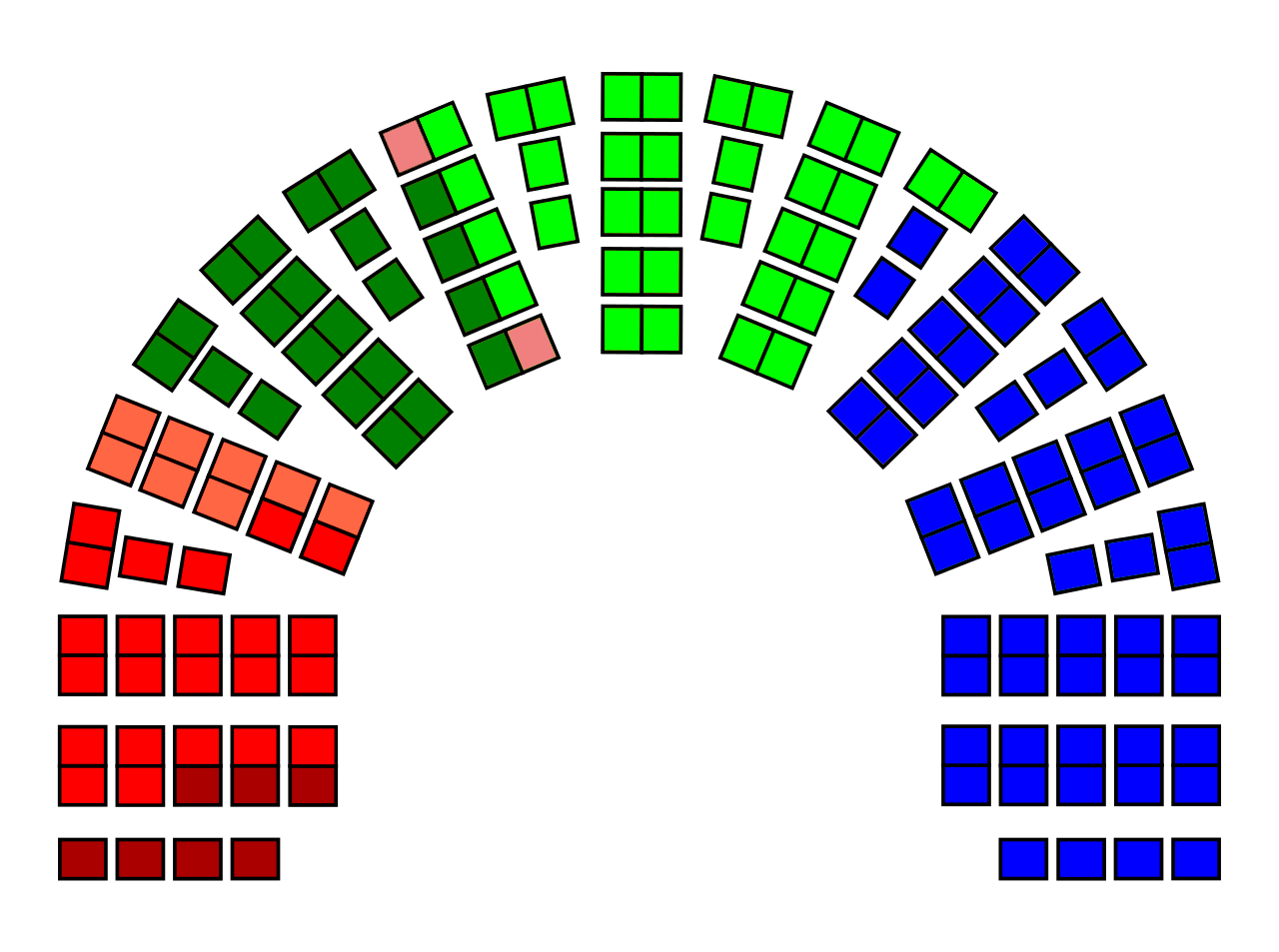 Mandatfordelingen etter Stortingsvalget 1924 illustrert med seter Norges Kommunistiske Parti Arbeiderpartiet Norges Socialdemokratiske Arbeiderparti Bondepartiet Radikale Folkeparti Venstre Høyre